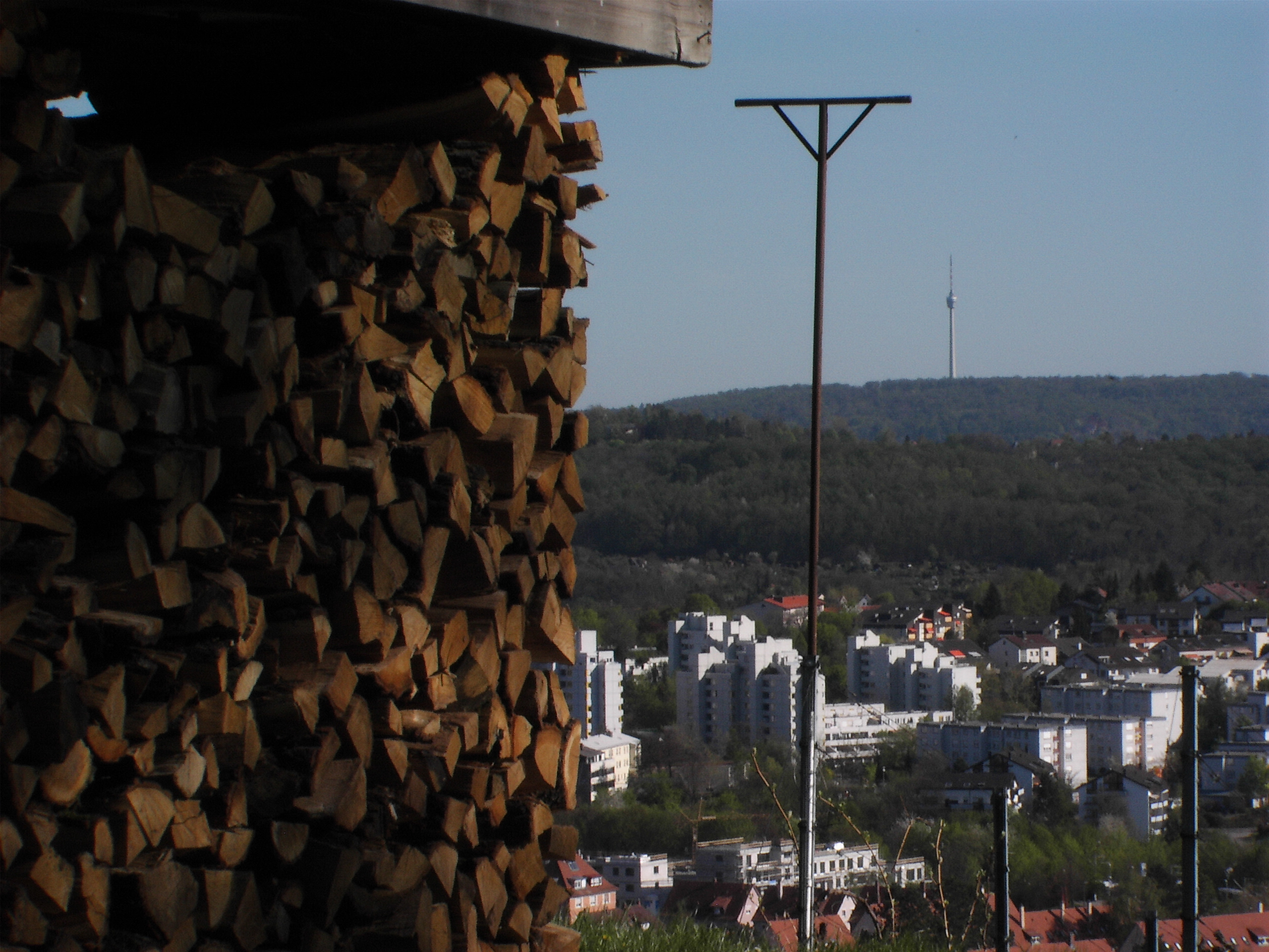 Sitzstange für Greifvögel als Stickel eines Spaliers im Weinbau